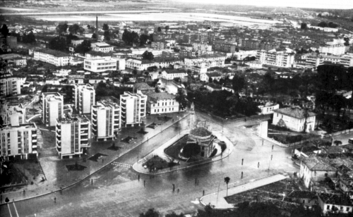 അൽബേനിയയിലെ വ്ളോർ തുറമുഖനഗരത്തിന്റെ ഒരു ദൃശ്യം.ഈ നഗരത്തിൽ വച്ചായിരുന്നു 1912-ൽ അൽബേനിയയുടെ സ്വാതന്ത്ര്യം പ്രഖ്യാപിക്കപ്പെട്ടത്